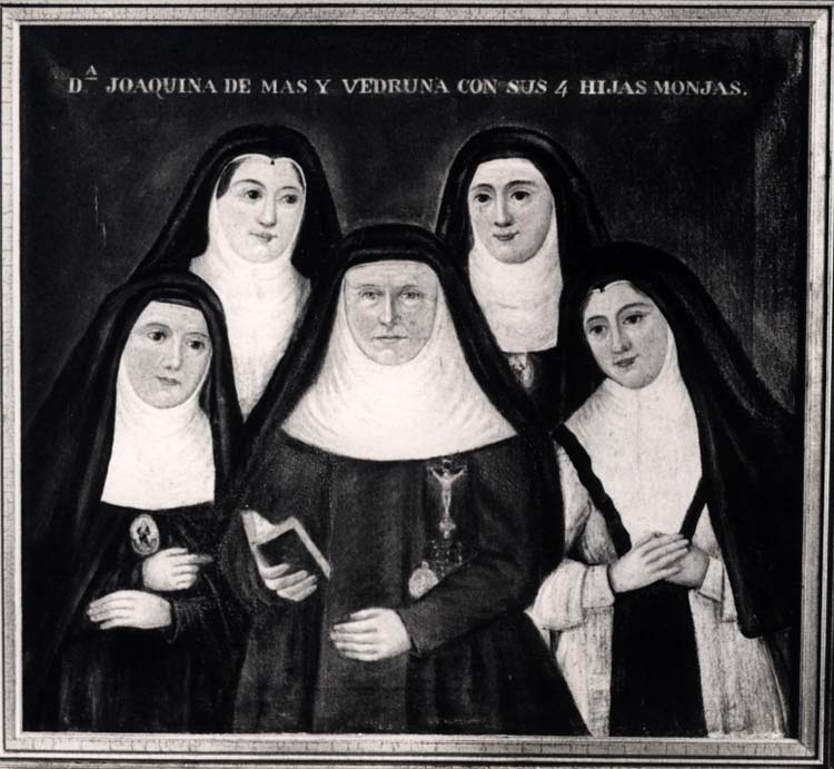 Santa Joaquima de Vedruna i les seves 4 filles monges. Quadre pintat per una néta de santa Joaquima a finals del segle XIX.